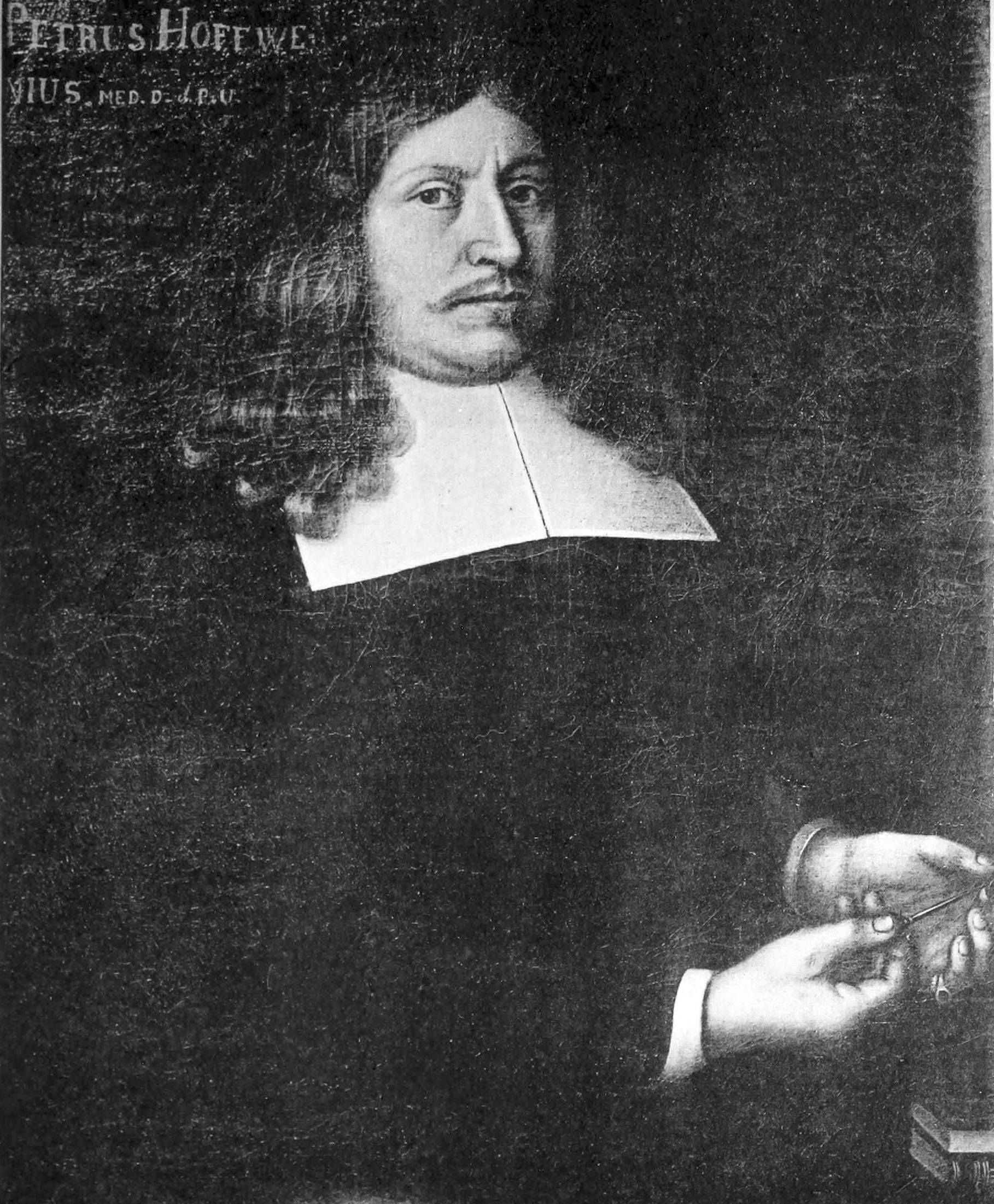 Petrus Hoffvenius (1630-1682). Medelålders man, midjebild, fas t. v., håller i högra handen ett instrument, med hvilket han pekar på ett uttaget öga, som han håller i venstra handen. Han har blå ögon, brungult hår benadt i midten och kammadt i lockar ned på axlarne, smala gula framtill underrakade mustascher med uppkrökta spetsar, litet pipskägg. Stor fyrkantig nedliggande hvit krage, svart rock, svart kappa med på ryggen nedliggande krage och vida ärmar med uppslag. Bakgrund mörk oliv, t. v. bokhylla och bord med två böcker bundna i svart band med guldprässning och guldsnitt; uppe t. h. står: Petrus Hoffwenius Med. D. et P. U. Natus anno 1630. Obiit anno 1682. Olja på duk, 80x64 ctm., af okänd mästare. Upsala universitet. Sbg. s. 36. Pl. IV.